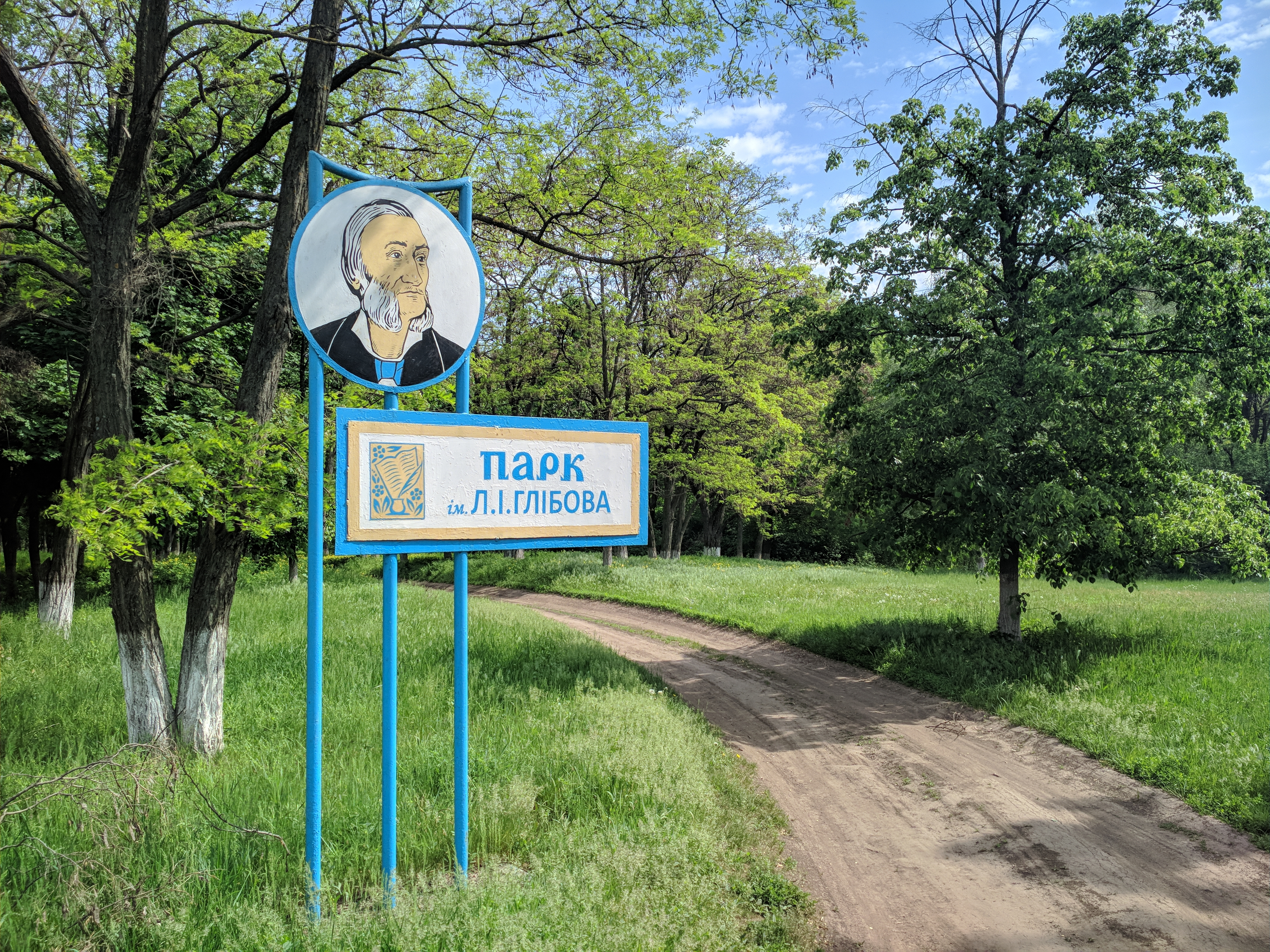 Парк ім. Л. І. Глібова, Семенівський р-н, с. Веселий Поділ